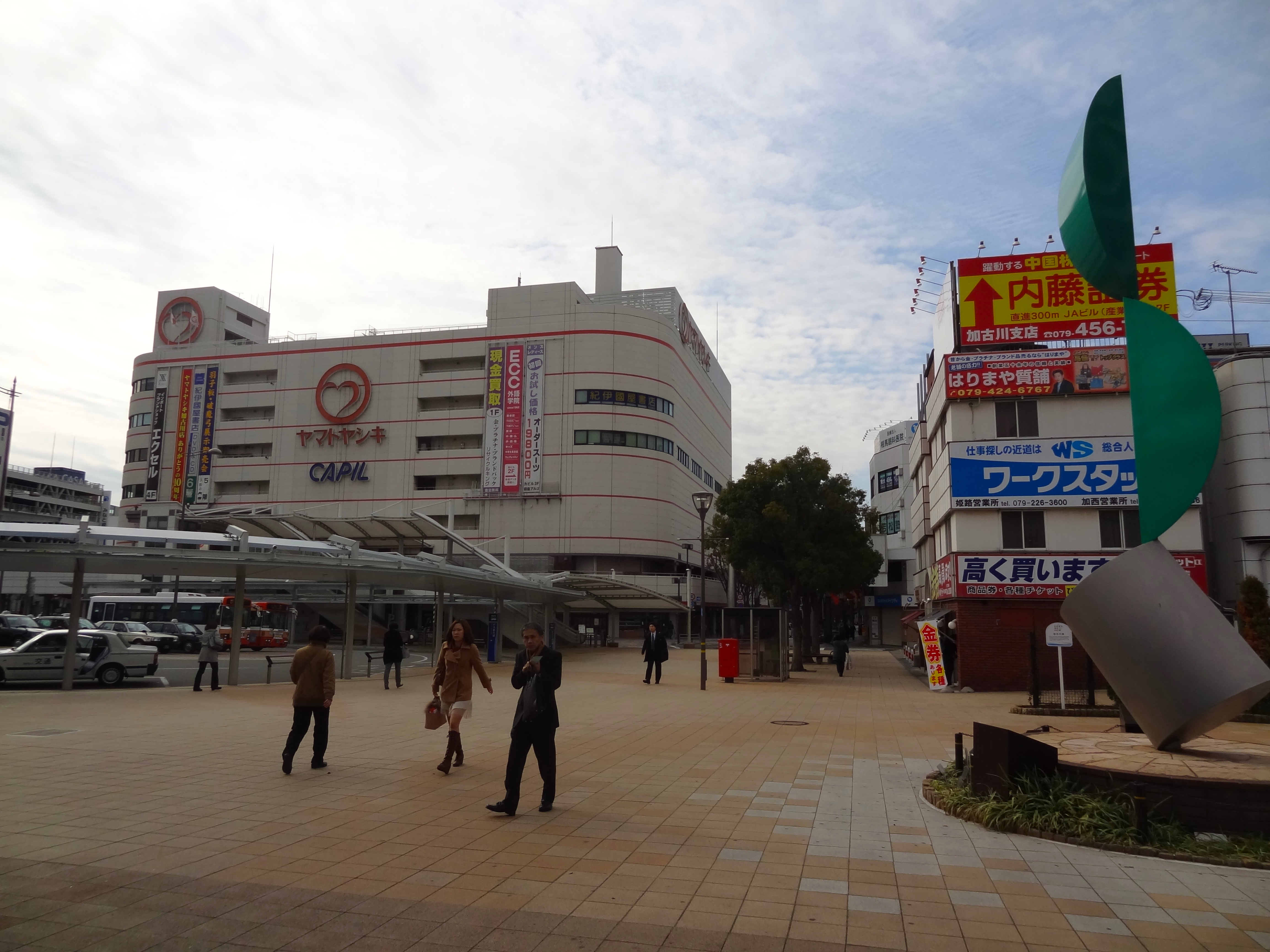 加古川駅 駅前広場とヤマトヤシキ加古川店 （2011年12月撮影）